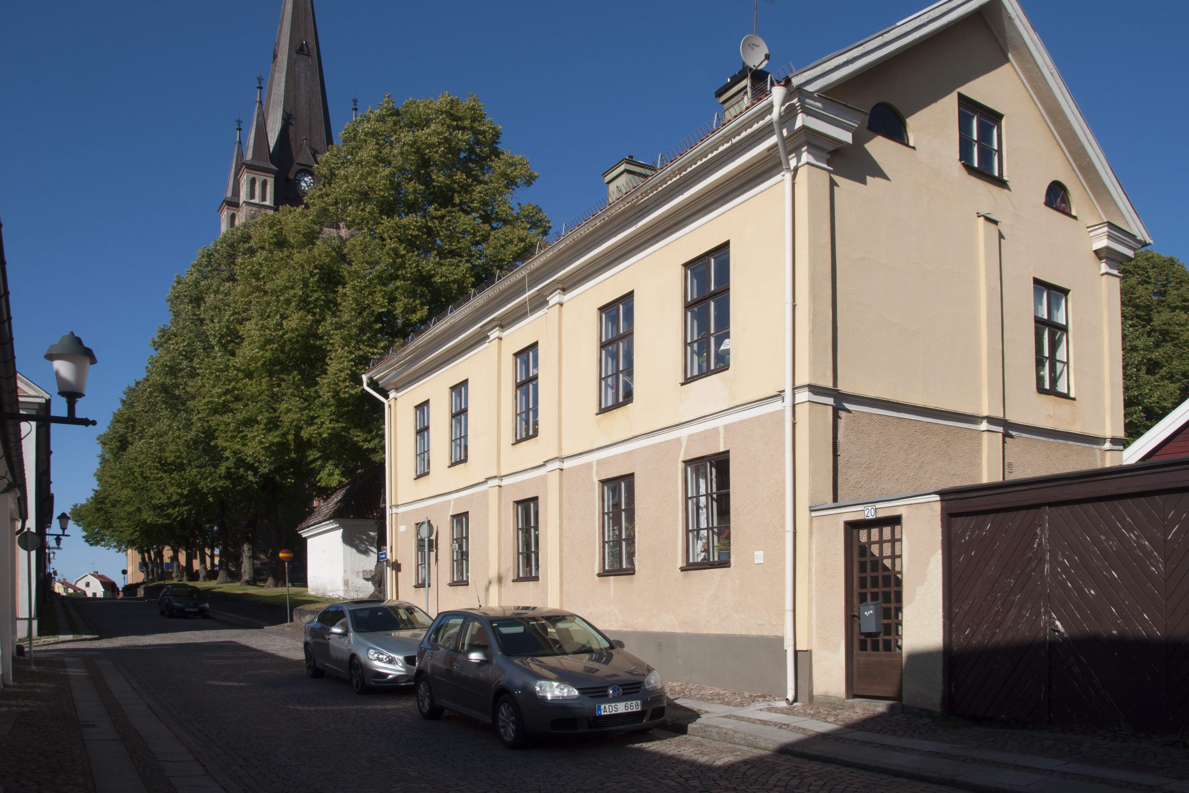 Mariestads gamla läroverk (1785-1854) , kv. Älgen 1. Kyrkogatan 20 / Prästgårdsgatan.